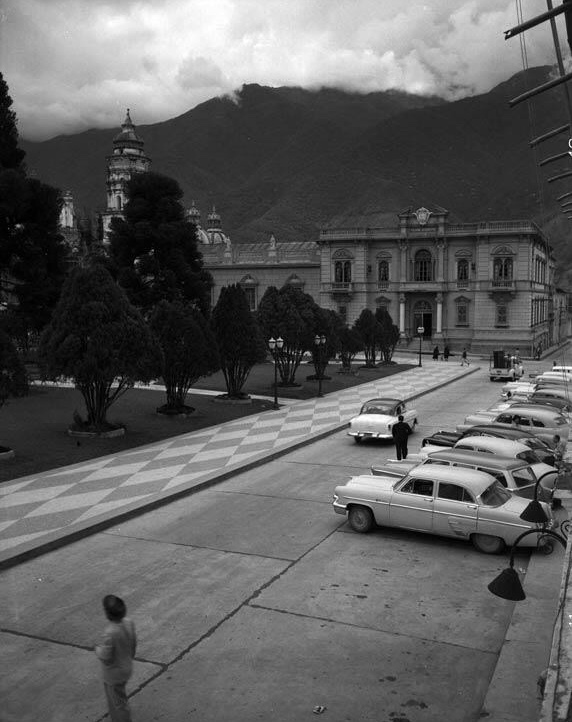 Plaza Bolívar de Mérida en 1955.